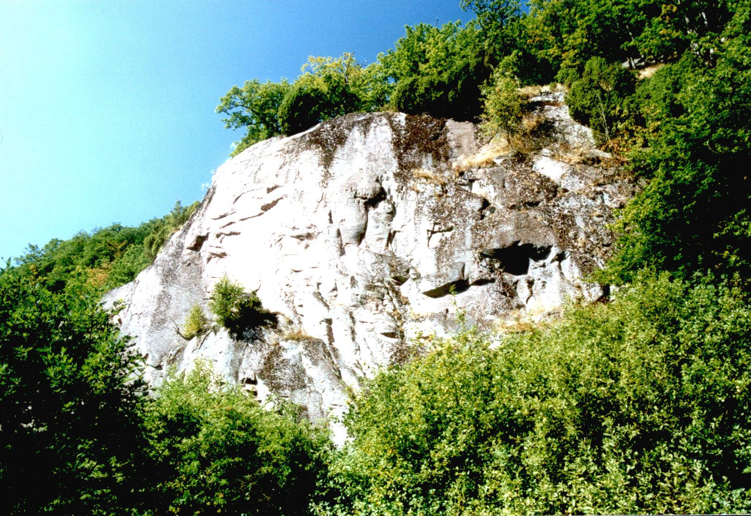 Felsabbruch im Ekkodalen auf Bornholm. Eigene Fotografie im August 1997.